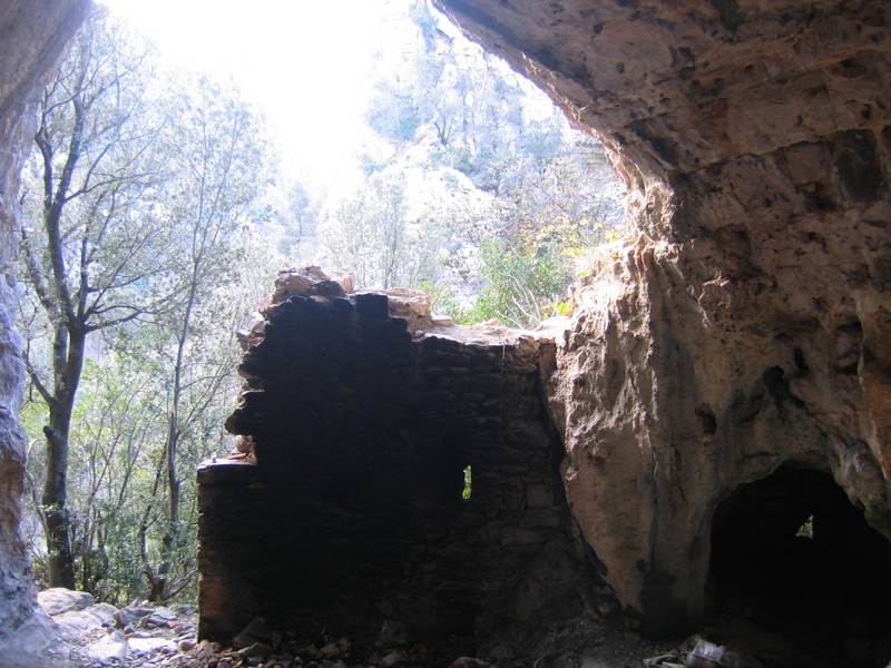 Description: Baume des Camisards de la Maudesse. Commune de Saint Julien-de-la-Nef (Gard, France). Cette caverne, baume fortifiée typique, servit d'abri aux Camisards pendant leur persécution. Source: Hugo Soria Licence: GFDL Hugo Soria